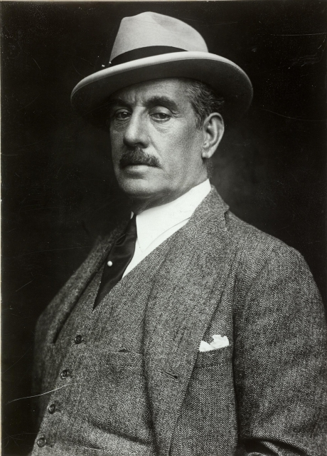 GiacomoPuccini. Bildnis in vorgerückten Jahren.